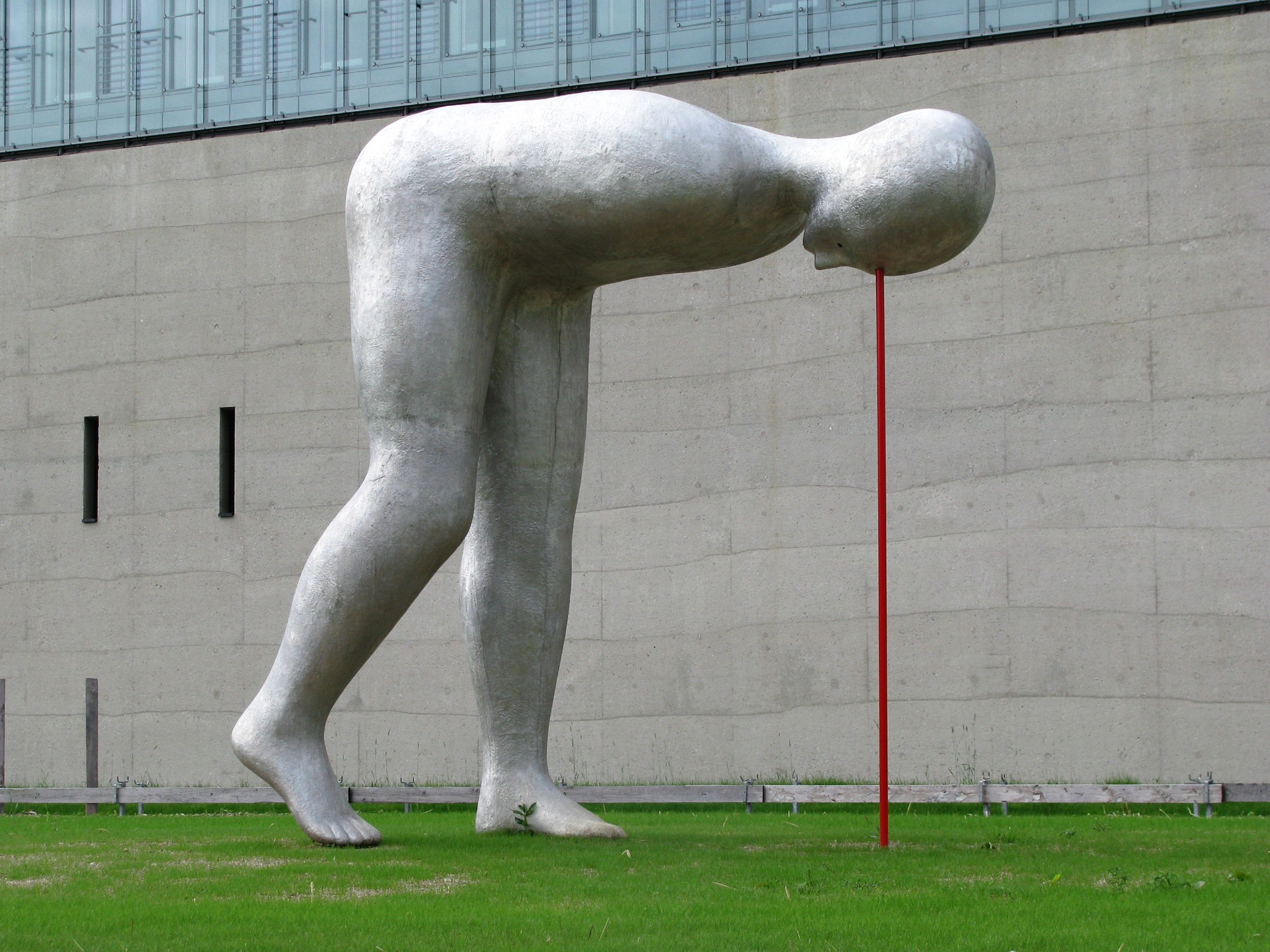 Skulptur „Present Continuous“ (dt.: „Gebückter Mensch, der nach unten schaut“) von Henk Visch vor dem neuen Gebäude der Hochschule für Fernsehen und Film und des Staatlichen Museums Ägyptischer Kunst in München